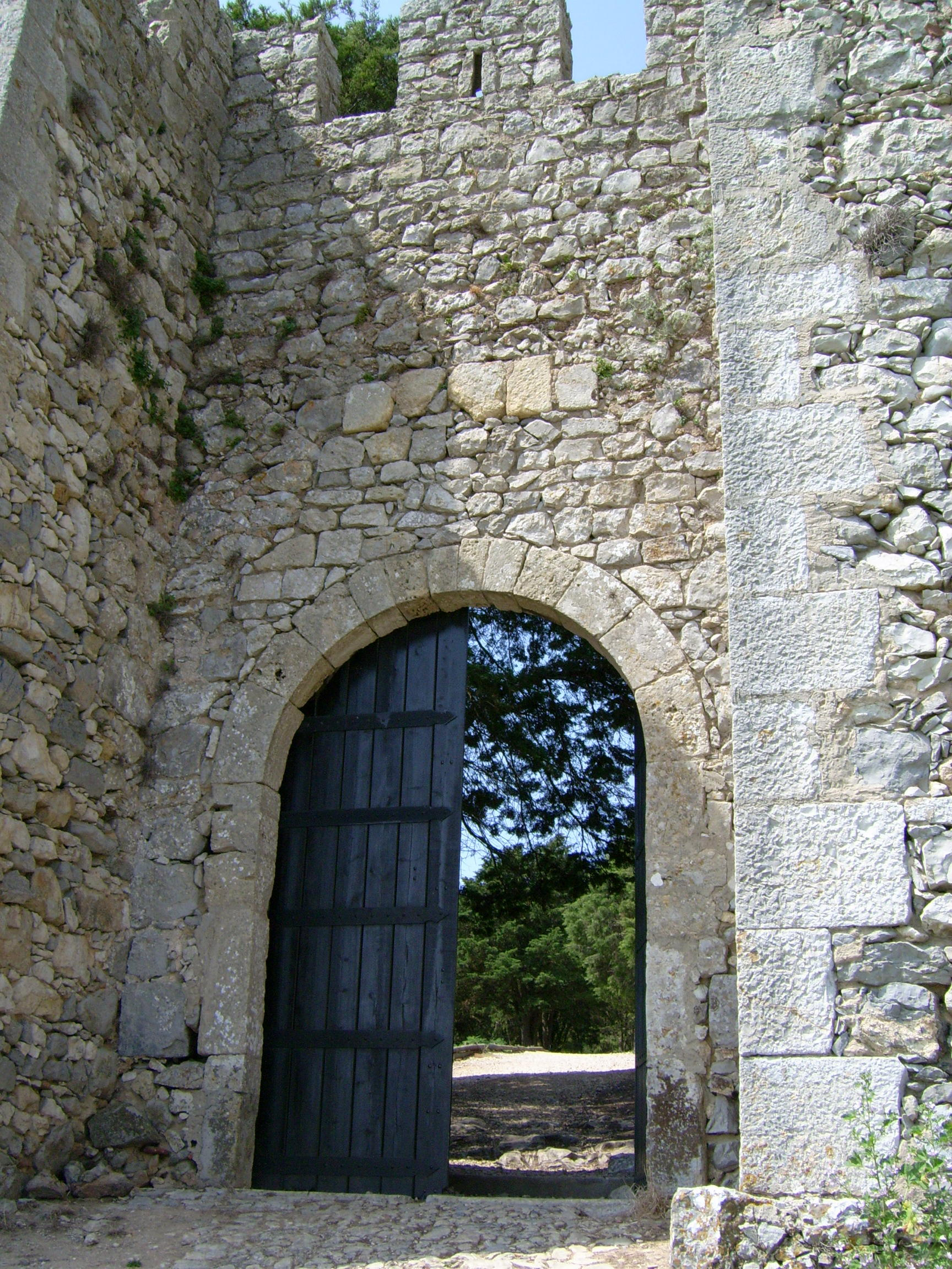 Castelo de Sesimbra - entrada principal user : sacavem